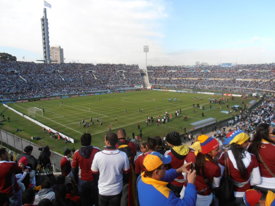 La selección de Venezuela en el estadio Centenario de Montevideo.